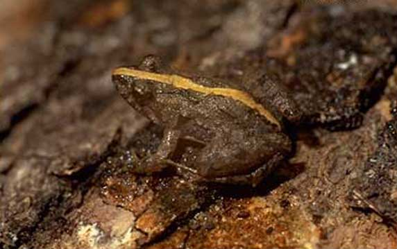 Pseudopaludicola falcipes